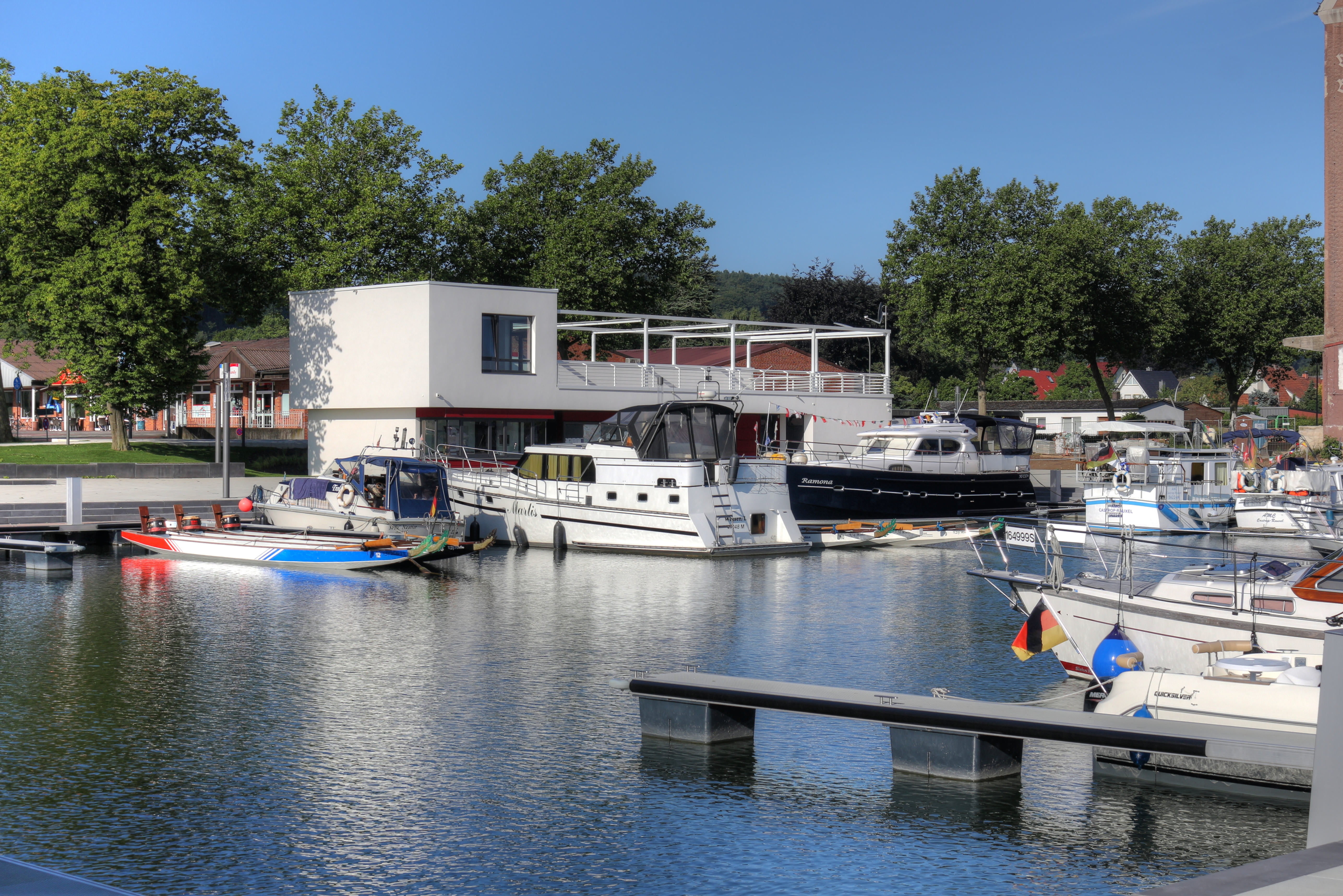 Marina Bad Essen